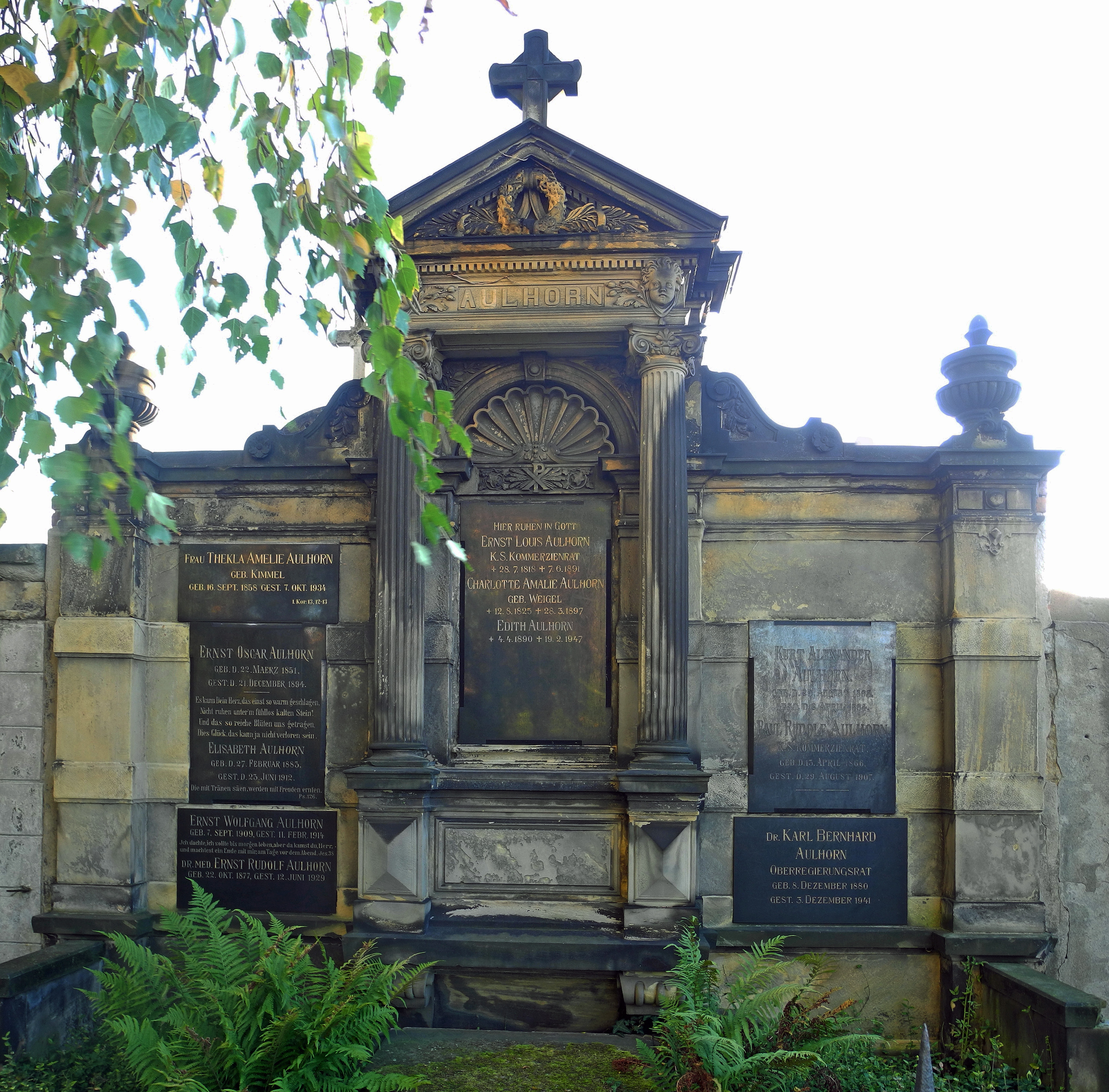 Alter Annenfriedhof in Dresden-Südvorstadt, Grabstätte von Ernst Louis Aulhorn (1818–1891), Gründer der Schokoladen- und Zuckerwarenfabrik „C.C. Petzold & Aulhorn“, siehe [1] mit folgenden Angaben Mittlere Tafel: Ernst Louis Aulhorn (* 28. Juli 1818; † 7. Juni 1891) Charlotte Amalie Aulhorn, geb. Weigel (* 12. August 1825; † 28. März 1897) Edith Aulhorn (* 4. April 1890; † 19. Februar 1947) Linke Tafeln: Thekla Amelie Aulhorn, geb. Kimmel (16. September 1858; † 7. Oktober 1934) Ernst Oskar Aulhorn (* 22. März 1851; † 21. Dezember 1894) Elisabeth Aulhorn (* 27. Februar 1883; † 23. Juni 1912) Dr. med. Ernst Rudolf Aulhorn (* 22. Oktober 1877; † 12. Juni 1929) Rechte Tafeln: Paul Rudolf Aulhorn (* 13. April 1866; † 29. August 1907) Dr. Karl Bernhard Aulhorn (* 8. Dezember 1880; † 3. Dezember 1941) Hinweis: Otfried Aulhorn (*11. Dezember 1917; † 15. Aril 1948) - Ehemann von Elfriede Aulhorn war der Sohn von Dr. Ernst Rudolf Aulhorn (1877–1929).